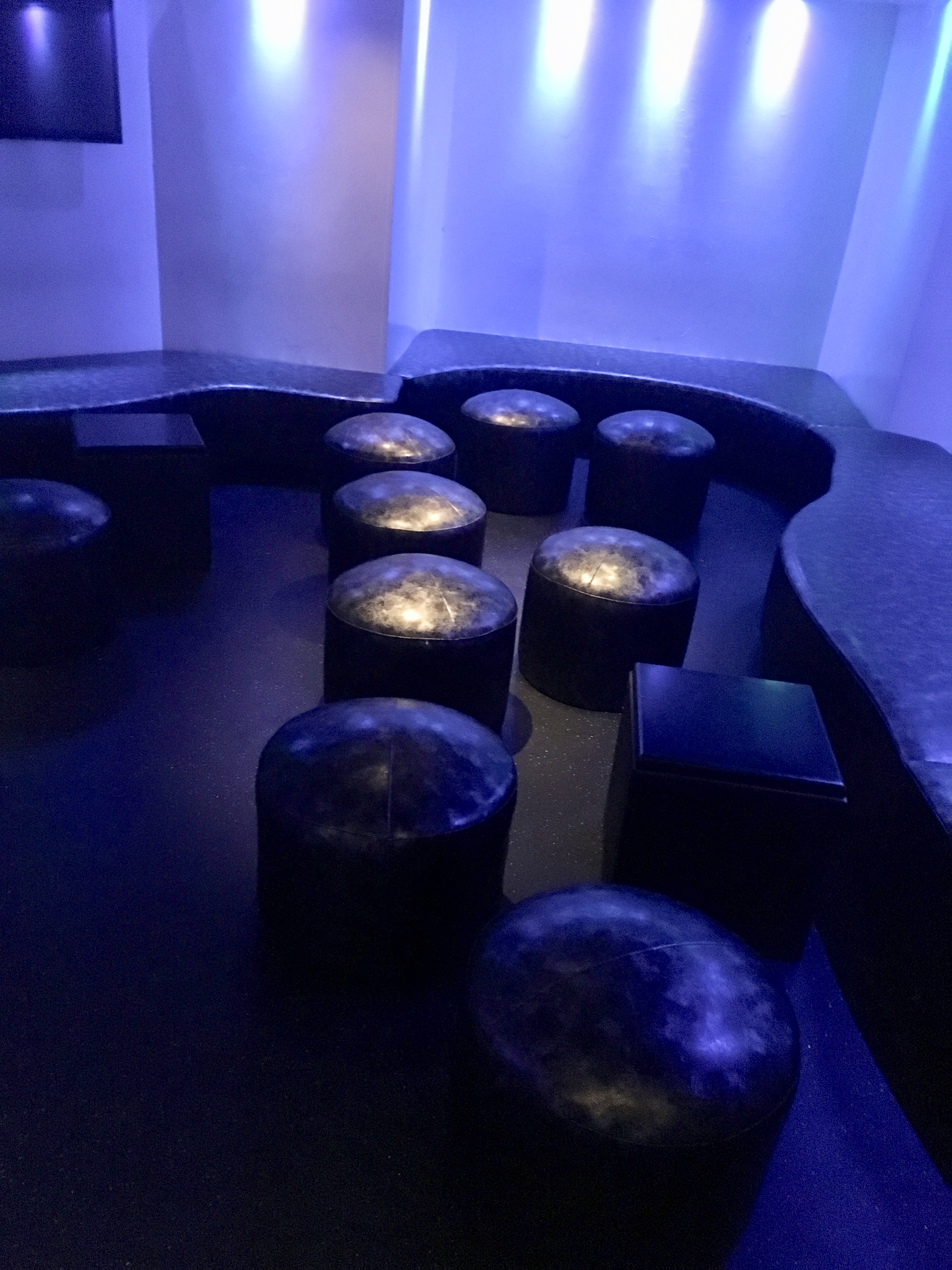 Space Electronic, discoteca di Firenze